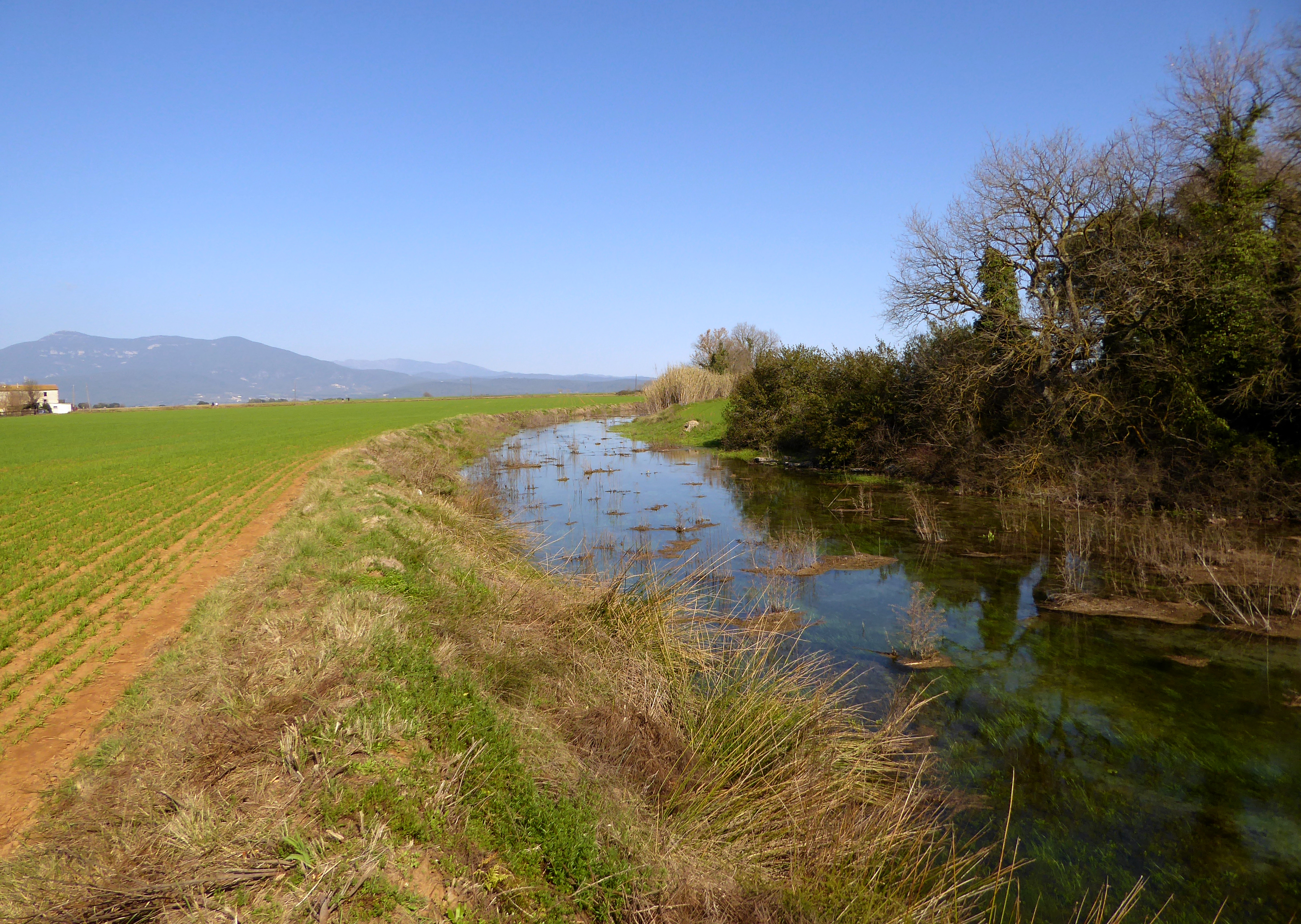 Inici del Rec d'Espolla encarat cap al nord. A la dreta de la imatge el petit bosc a la Serra d'Espolla. Al fons de la imatge la silueta de la Serra del Mont